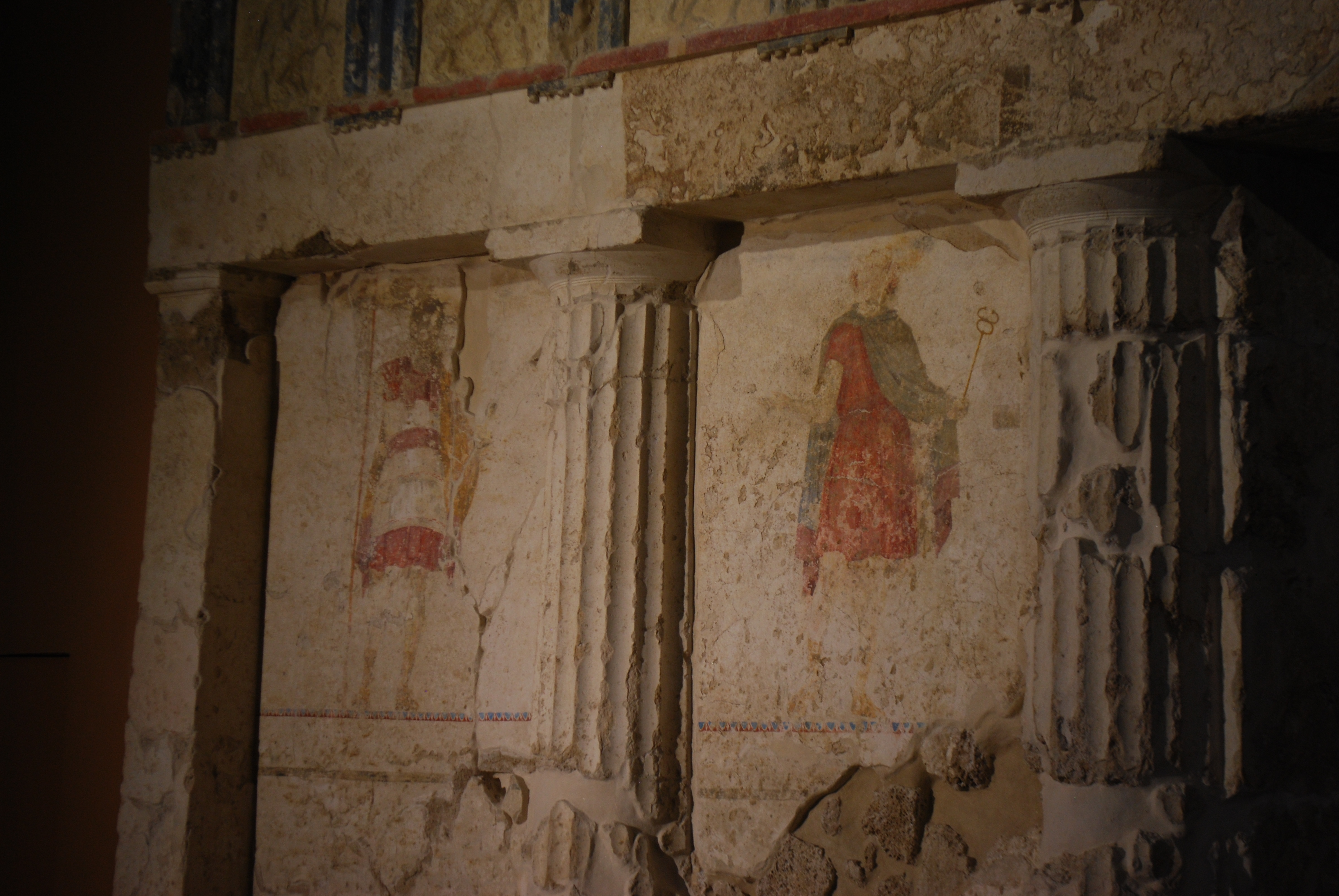 Vue des tombes macédoniennes de Mieza (Naousa).